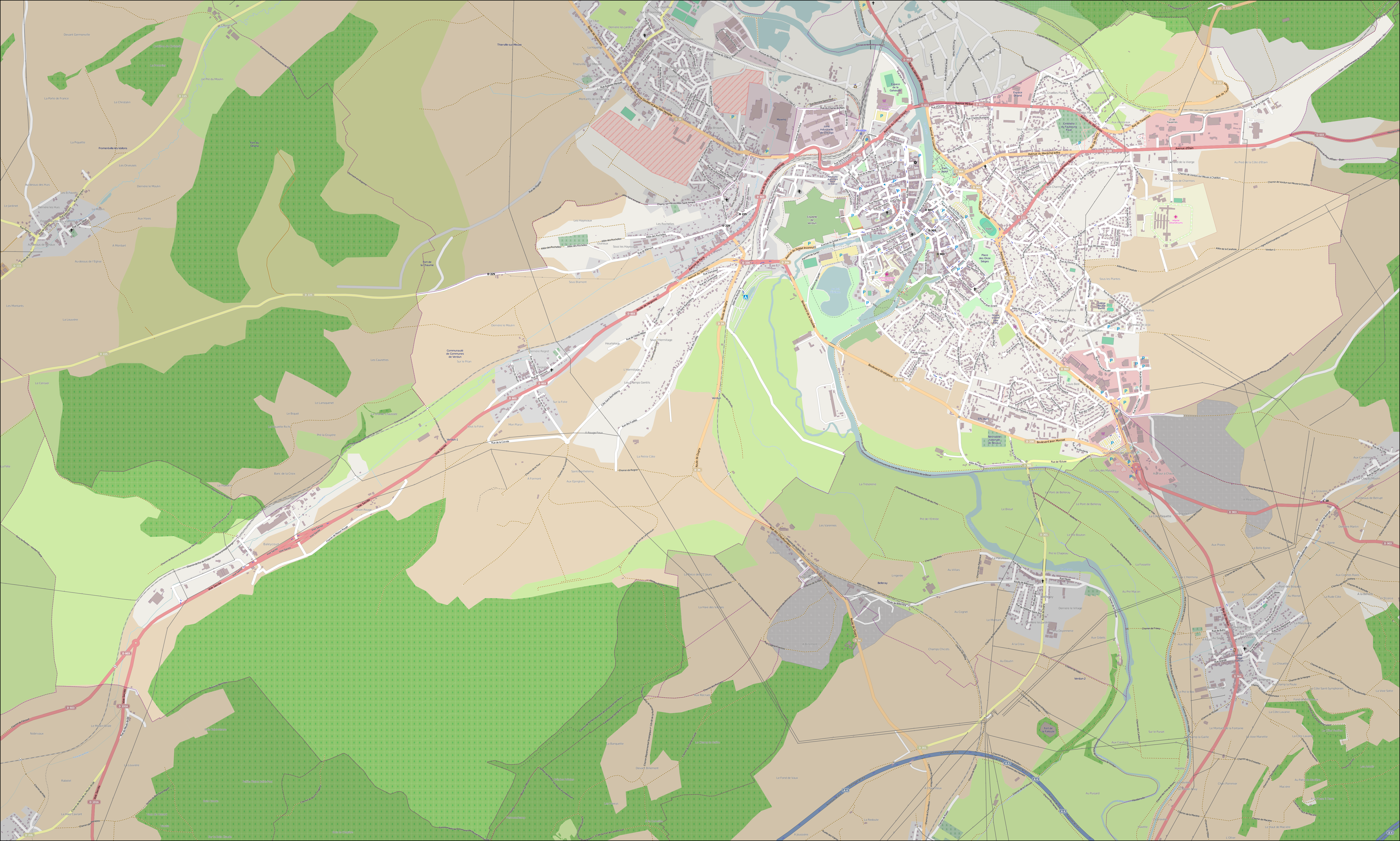 Plan de la commune de Verdun (55100) avec OpenStreetMap.